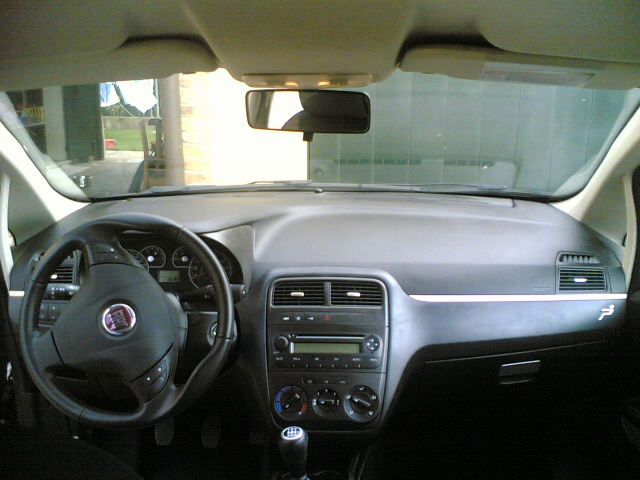 interni della Fiat Grande Punto